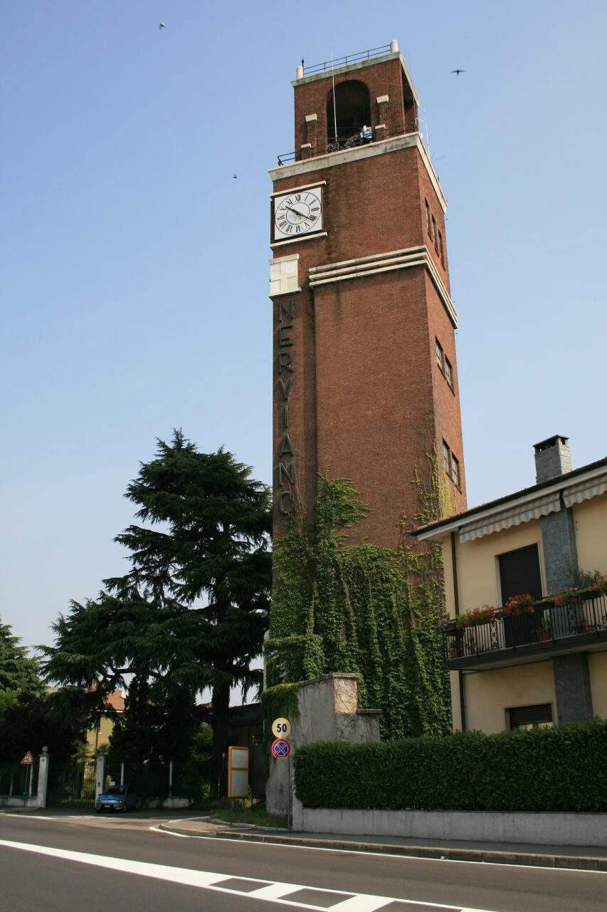 Nerviano, Torre dell'Acquedotto (già Torre Littoria)